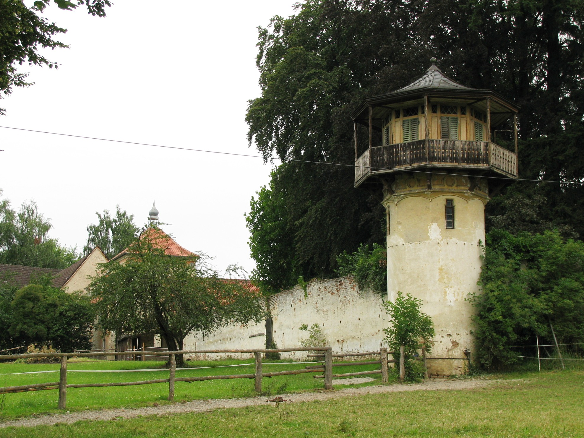 Schloss Hammel; Umfassungsmauer und sog. Malakowturm, mit Holzaufbau, 1856